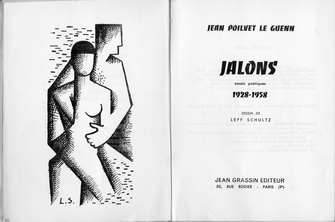 копия титула и авантитула сборника стихов Ж. Пуавльве ле Гана "Вехи". Иллюстрация Л. Шульца. 1959